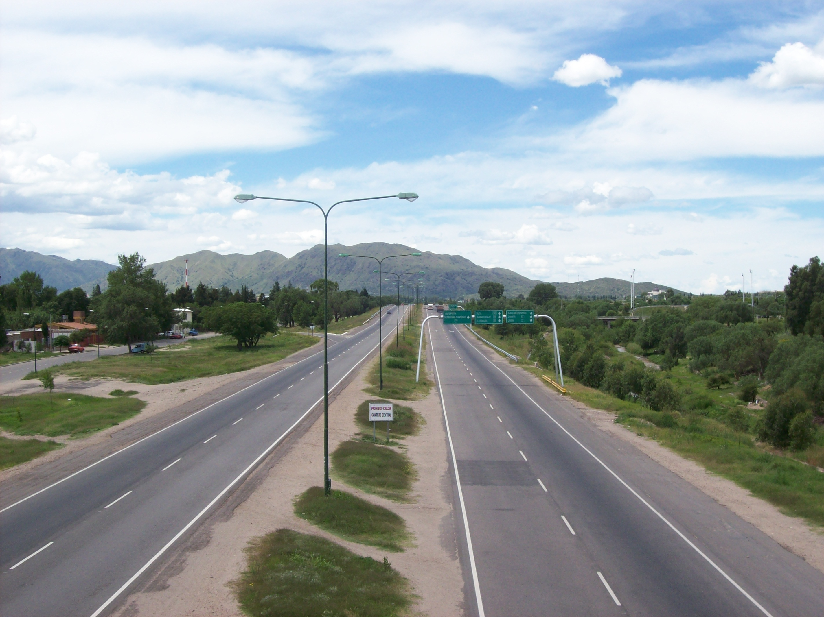 Avenida Parque Gobernador Santos Ortiz en el sur de la ciudad de San Luis, Provincia de San Luis, Argentina.